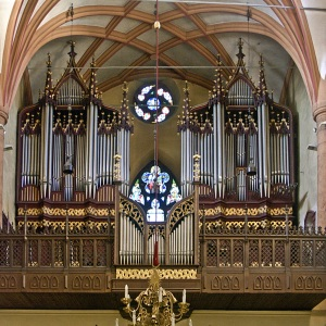 Orgle v mariborski stolnici